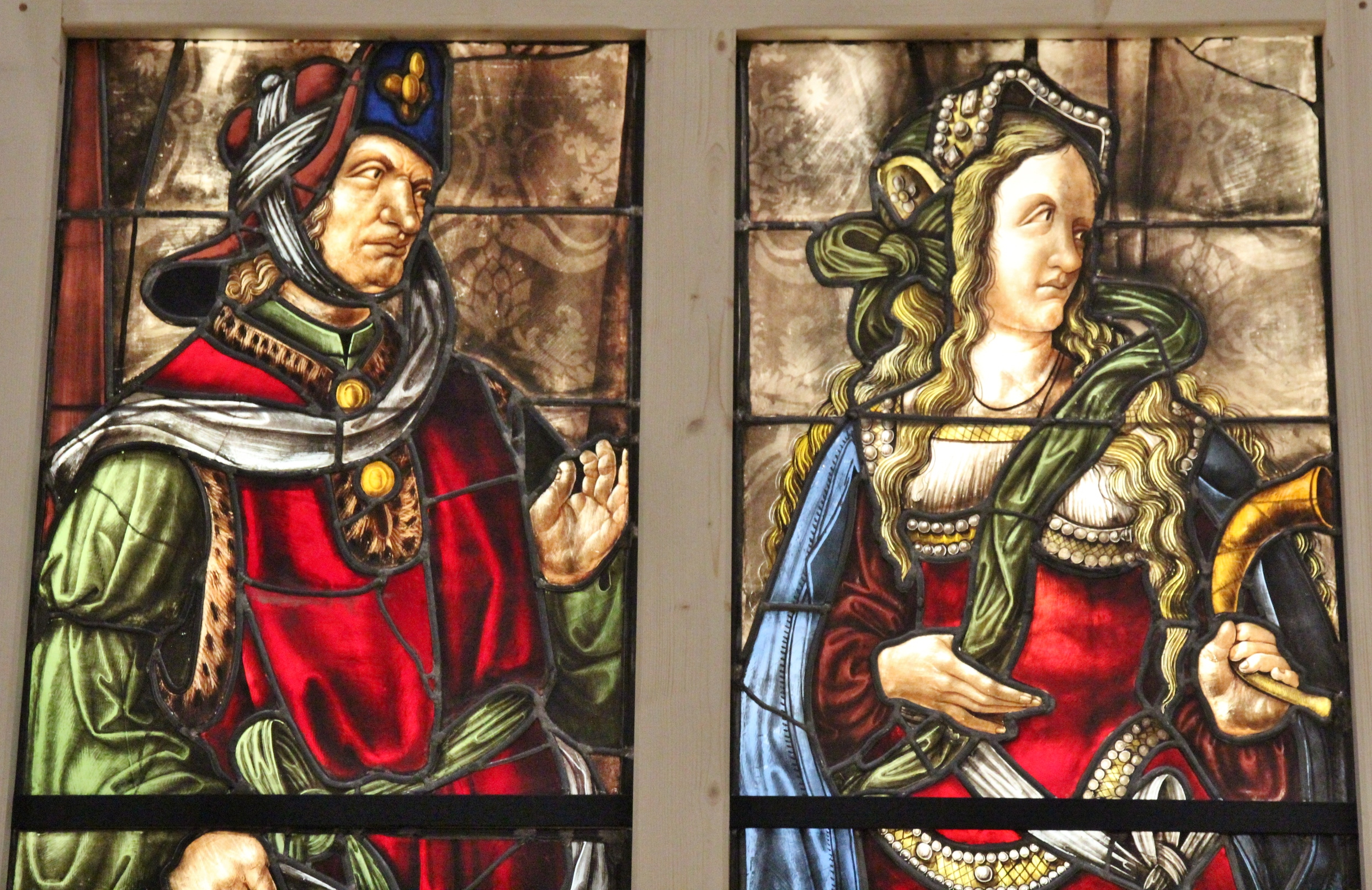 Vitrail d'Arnaud de Moles, cathédrale d'Auch (16ème siècle).